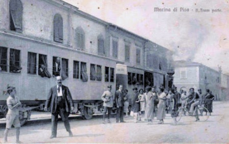 Marina di Pisa, capolinea tranviario